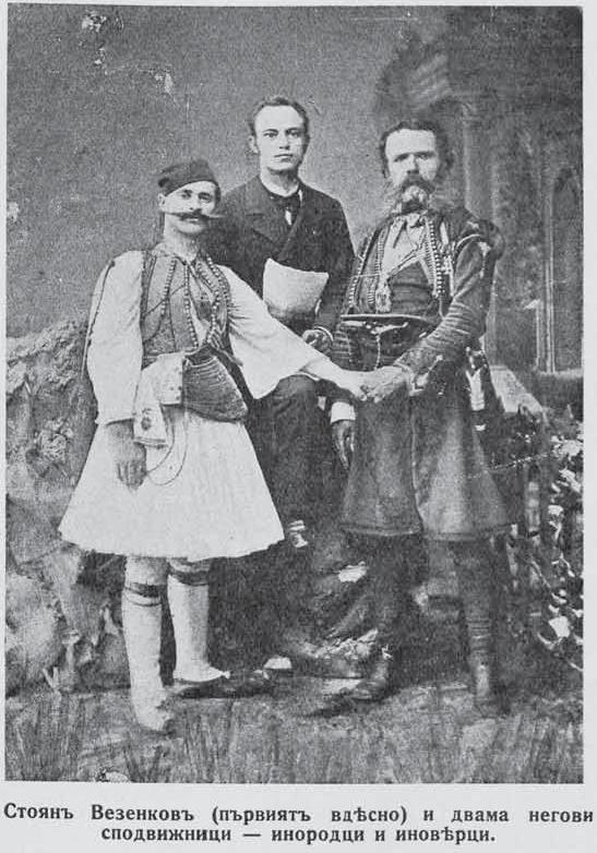 Стоян Везенков, най-вдясно